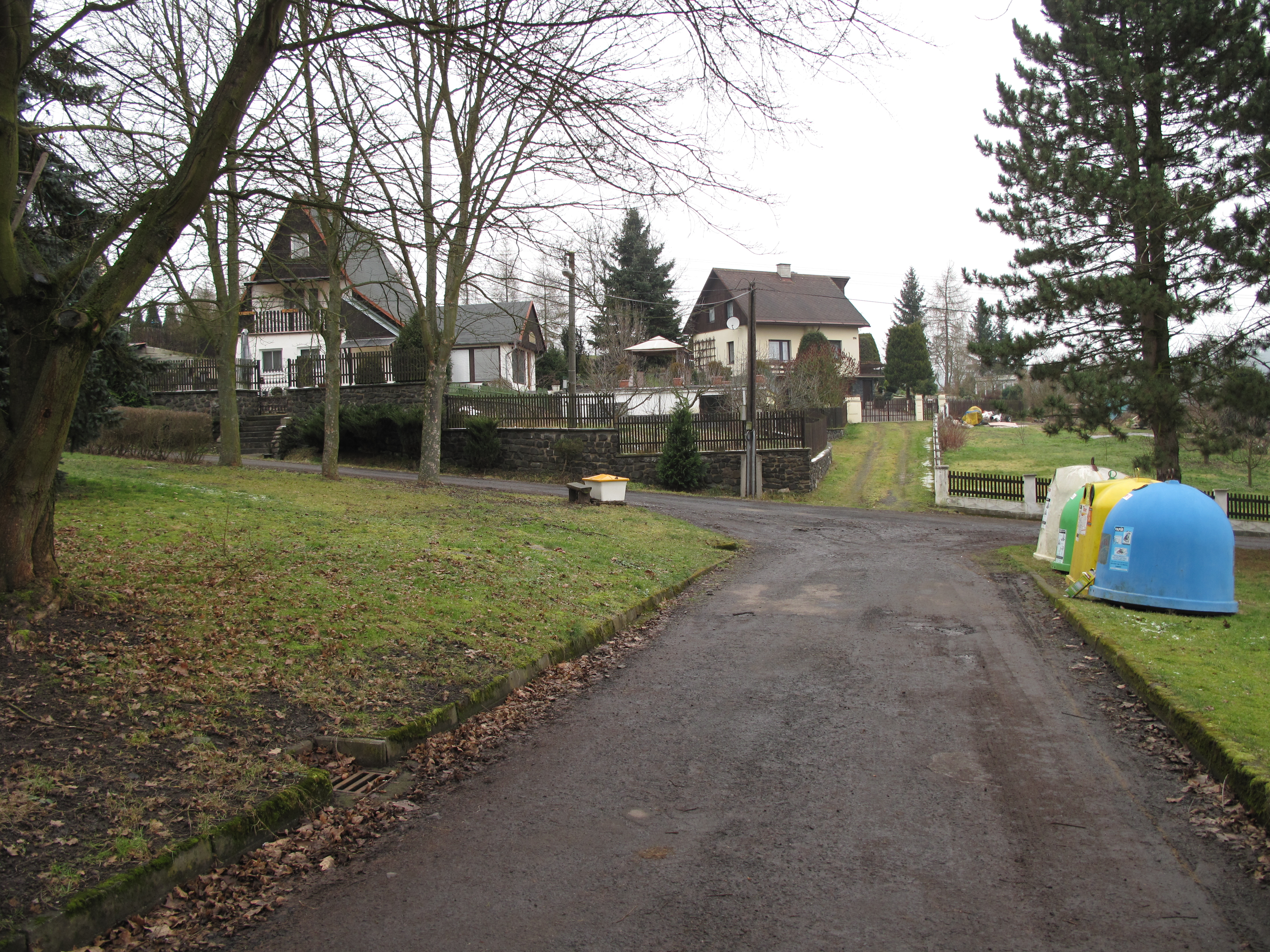 Cesta v Šemnicích. Okres Karlovy Vary, Česká republika.